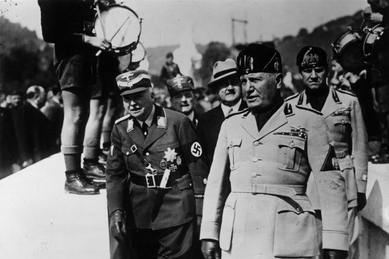 Italien, deutsche Frontkämpfer in Rom Die deutschen Frontkämpfer im Forum Mussolini. Am Sonnabend [19.3.38] fand in Gegenwart des Duce im Forum Mussolini eine grosse sportliche Veranstaltung zu Ehren der deutschen Frontkämpfer, die zur Zeit in Rom weilen, statt. U.B.z. Mussolini trifft in Begleitung des Grafen Galeazzo Ciano und des Herzogs von Koburg-Gotha im Forum Mussolini ein. 21.3.1938 [Herausgabedatum] Abgebildete Personen: Sachsen-Coburg und Gotha, Karl-Eduard von: 1884-1954, Herzog, Präsident des Deutschen Roten Kreuzes, Deutschland Mussolini, Benito: Ministerpräsident, Regierungschef, Chef des Faschistischen Großrates, Italien